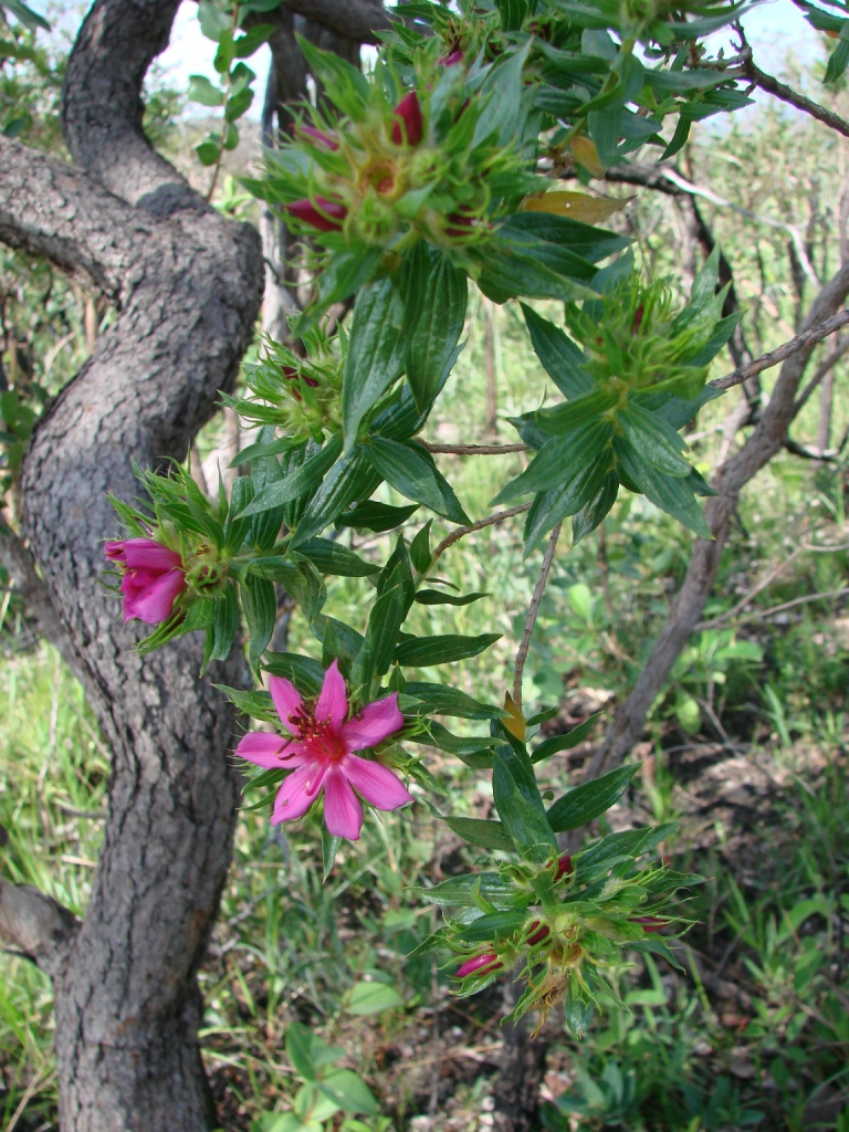 Stenodon gracilis - MELASTOMATACEAE Parque Nacional da Chapada dos Veadeiros - Povoado São Jorge - Alto Paraíso de Gioás - Goiás - Brasil.